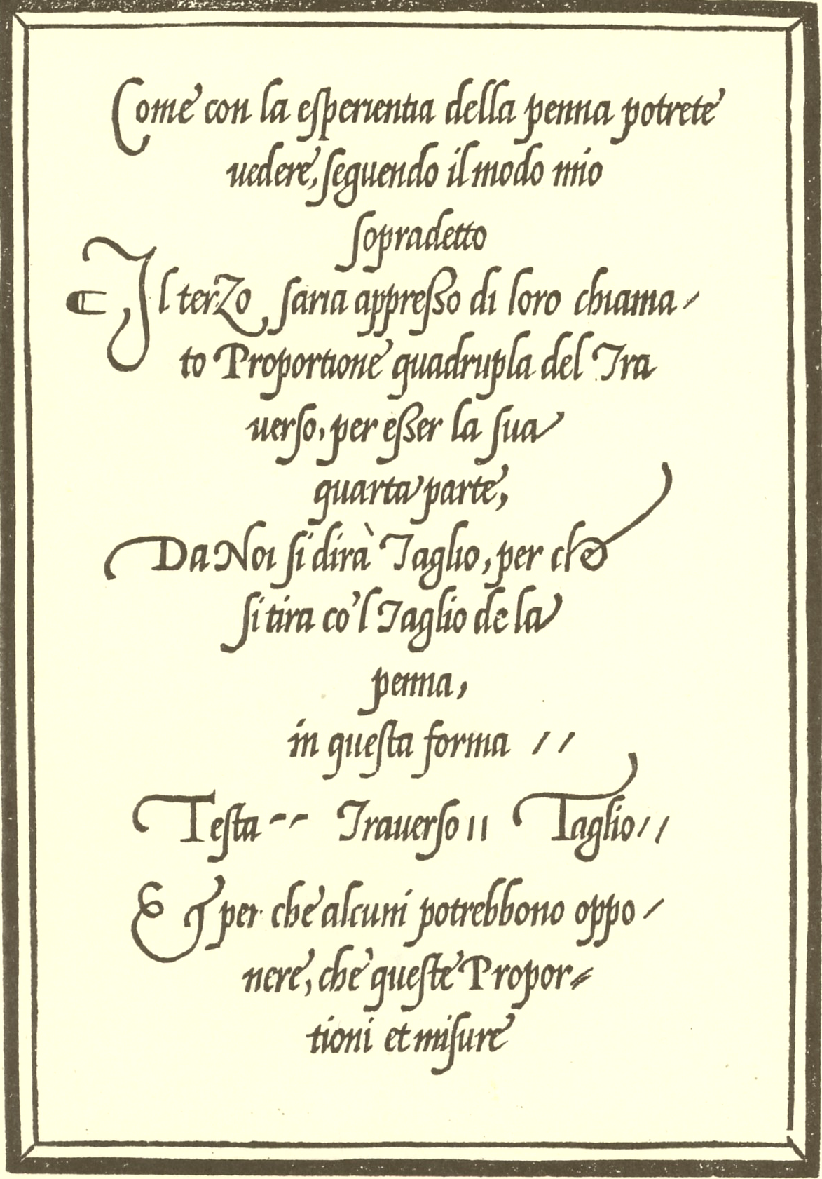 Seite 18 aus dem Schreibmeisterbuch des Giovanni_Battista_Palatino: "Libro nuovo d’imparare a scrivere..." Rom 1540